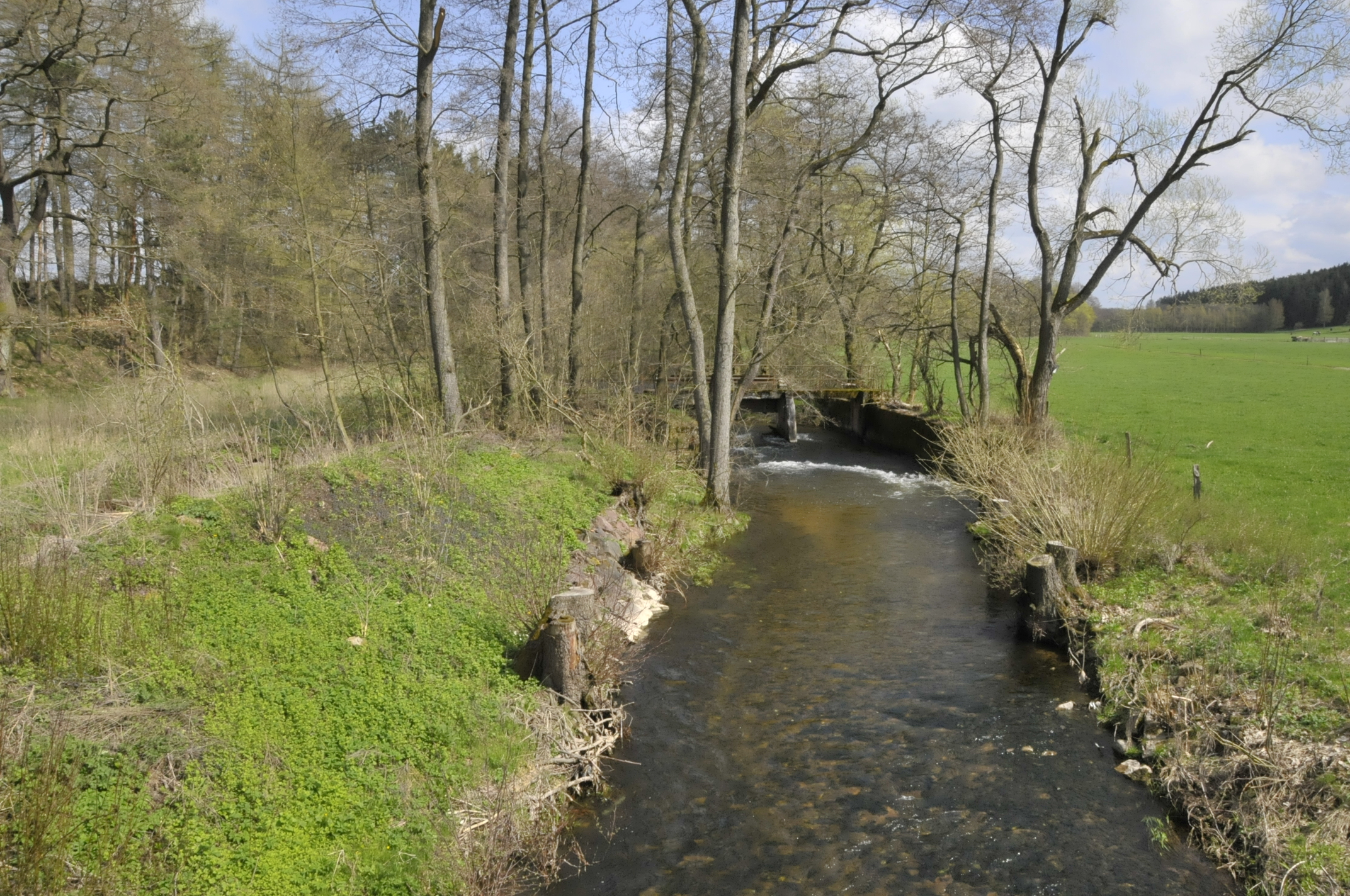 Wohlrose, 200 m vor der Mündung in die Ilm